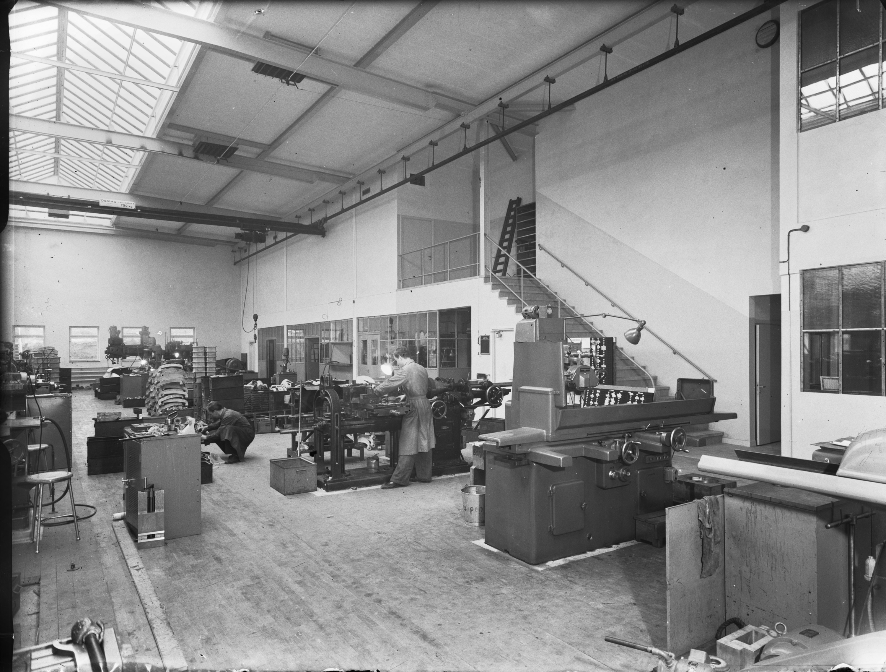 Wedaverken AB W Dan Bergman interiör tillverkning med anställda Södertälje, Södermanland